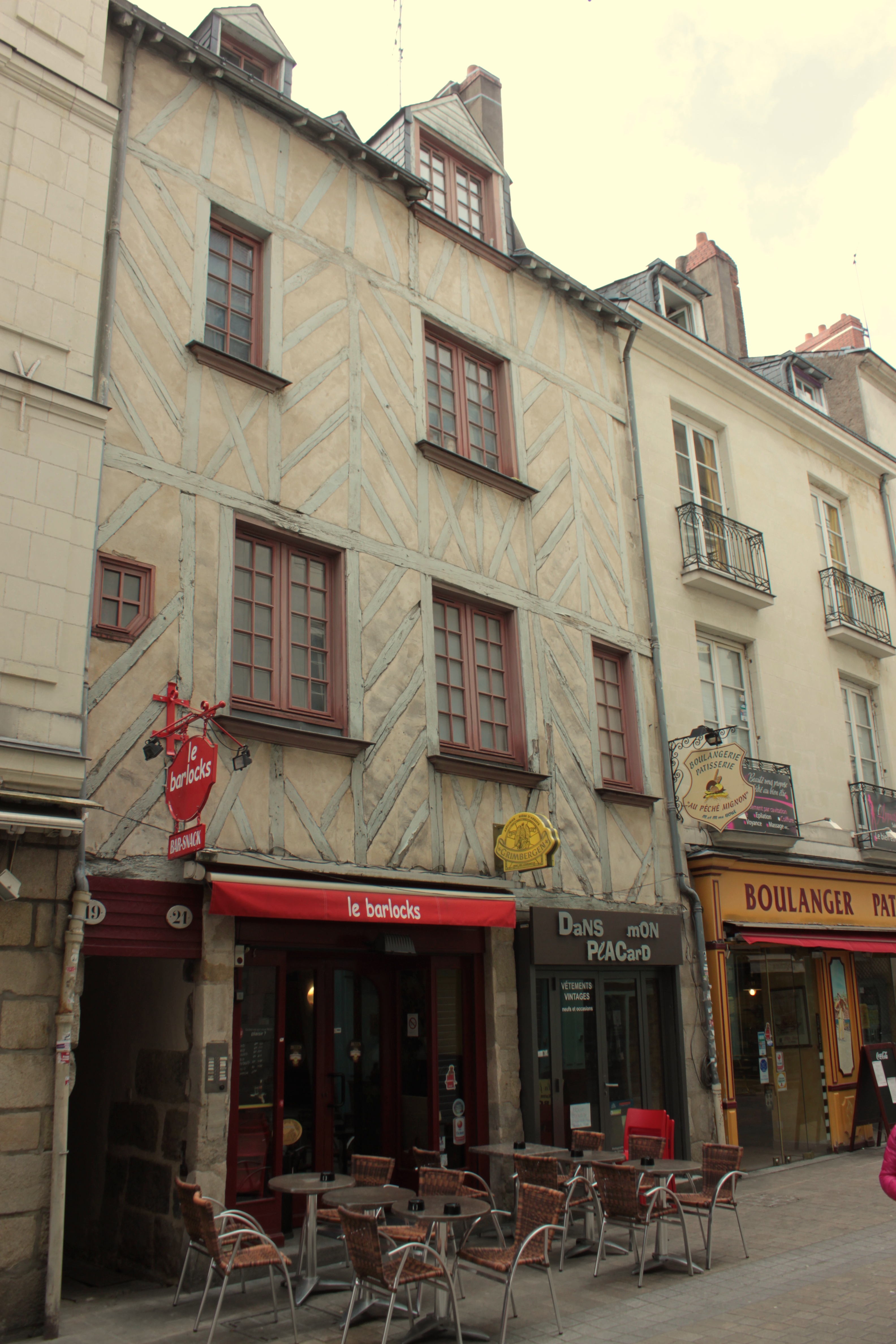 19, Rue des Carmes, Fr-44-Nantes.